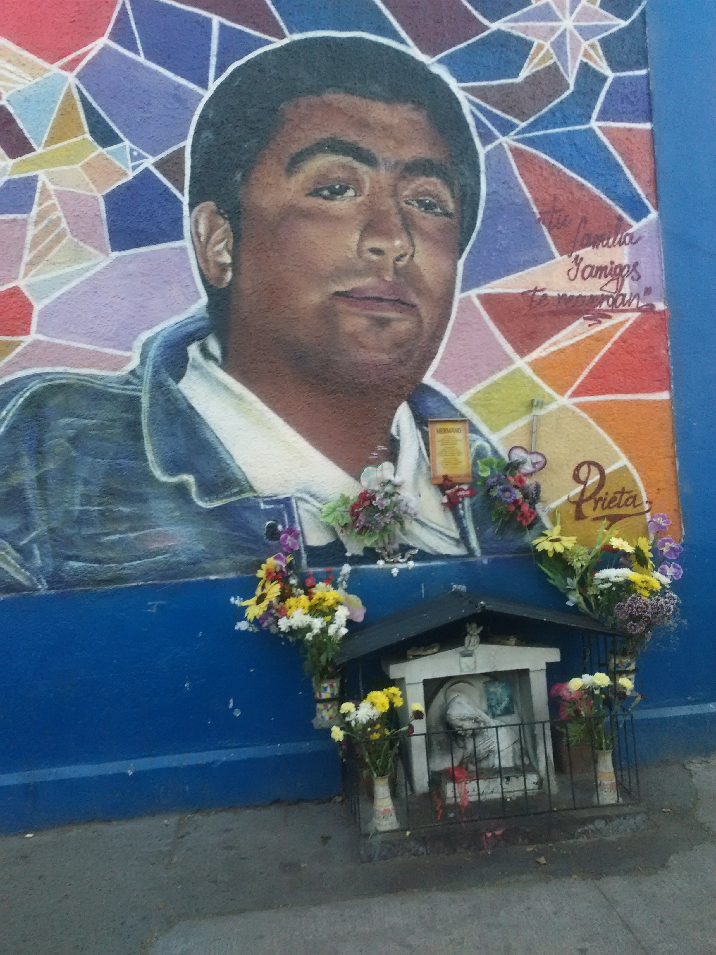 Animita a fallecido en forma violenta en Barrio Franklin en Santiago, sector Persa de Biobio